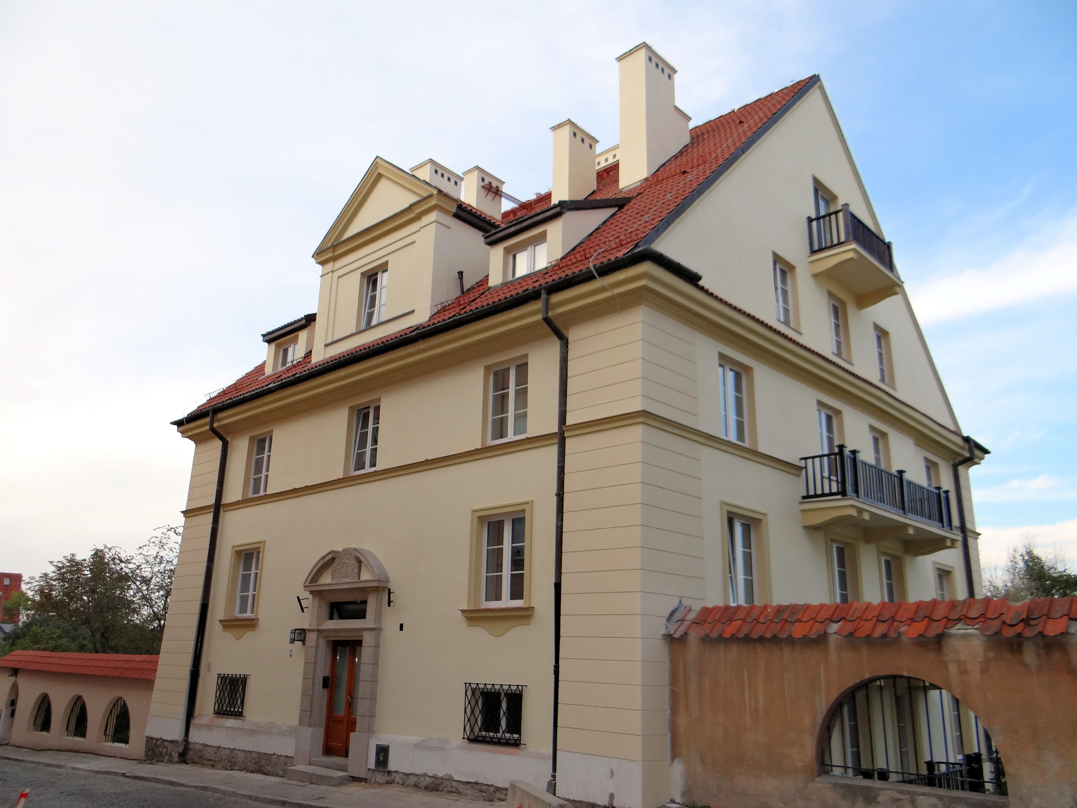 Dom z XVII-XVIII w, po wojnach odbudowywany raz w 1920r, drugi raz w 1959. Podwórze i ogród od ulicy oddziela mur.